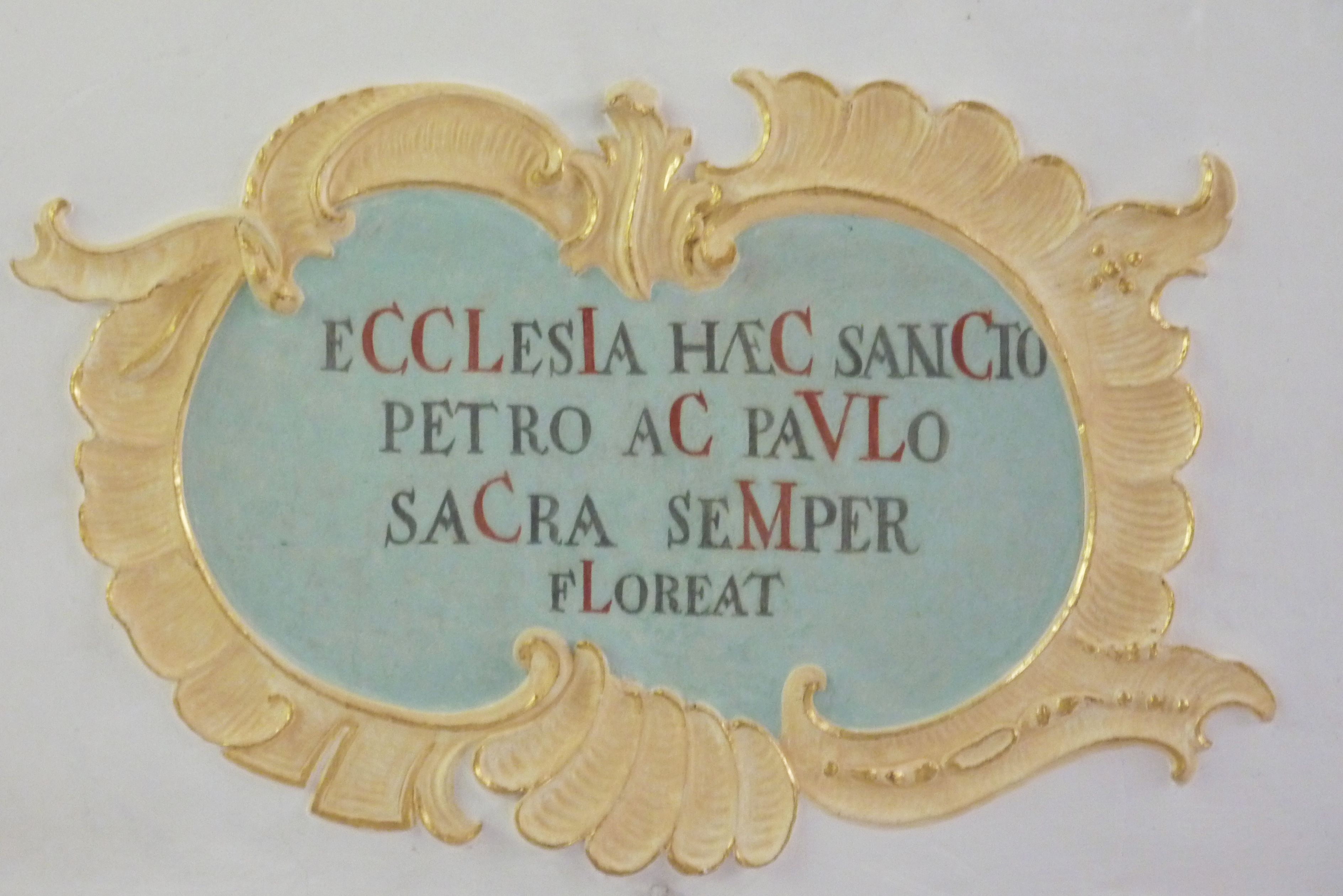 Katholische Pfarrkirche St. Peter und Paul in Sonderheim (Höchstädt an der Donau), Stuck aus der Zeit um 1756, Muschelwerkkartusche im Chor mit Chronostichon: „eCCLesIa haeC sanCto petro aC paVLo saCra seMper fLoreat“ (diese den Heiligen Petrus und Paulus geweihte Kirche möge immer blühen). Die Großbuchstaben entsprechen römischen Zahlen und ergeben addiert die Jahreszahl 1756.